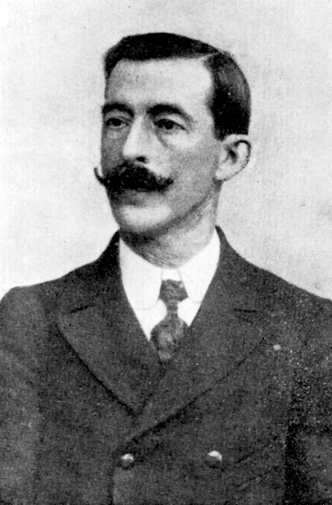 Ricardo Mella Cea (né le 23 avril 1861 à Vigo (Espagne) - mort le 7 août 1925) est un pédagogue libertaire, écrivain, penseur et militant anarchiste.